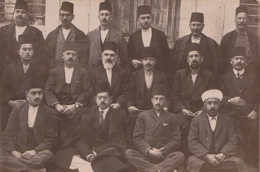 Şevket Dağdeviren, Hanya'da sürgünde. Cem Altınel özel koleksiyonundan